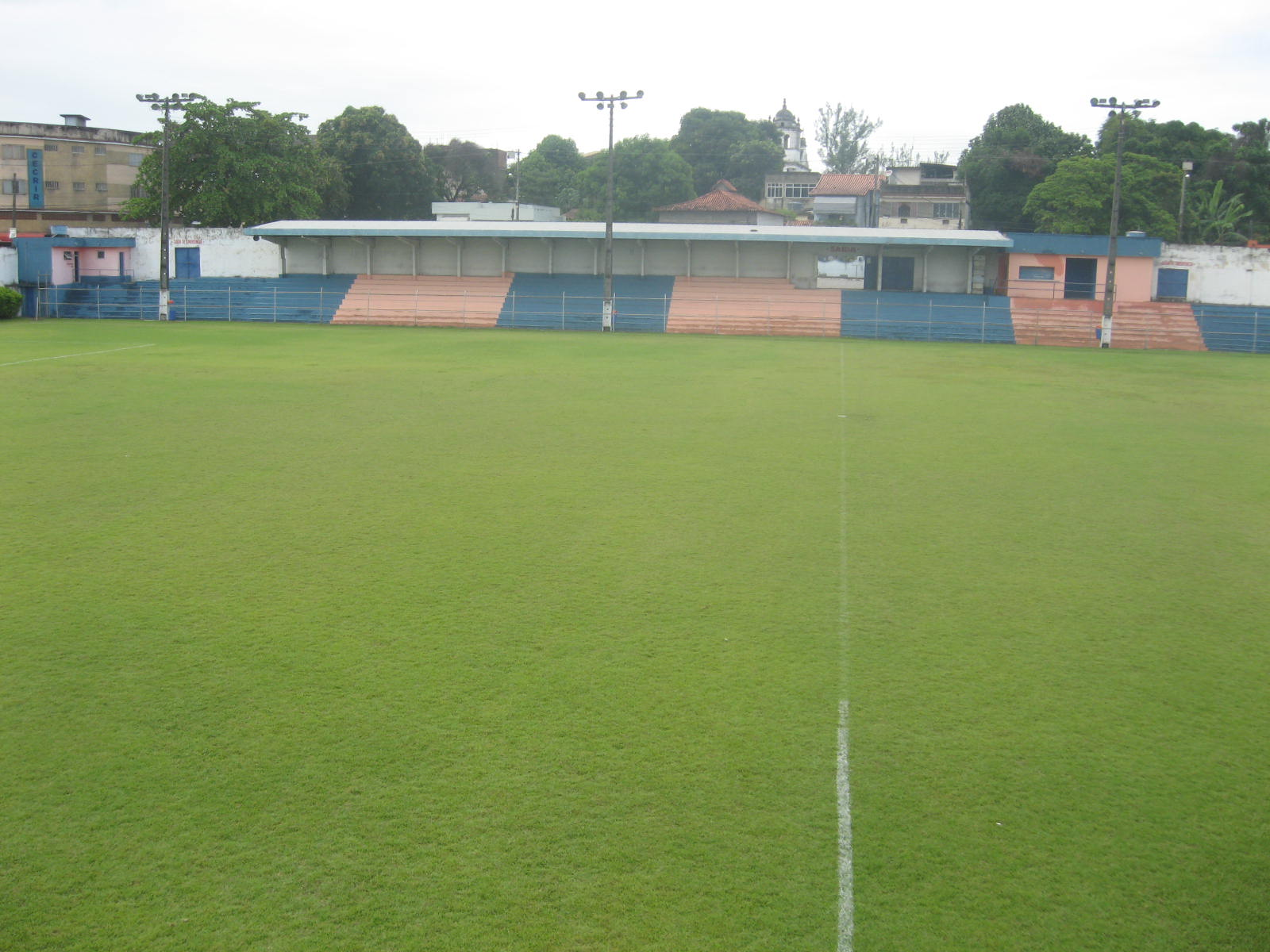 Estádio Municipal Alziro de Almeida (Alzirão), capacidade para 4.000 espectadores, localizado em Itaboraí, RJ, Brasil.